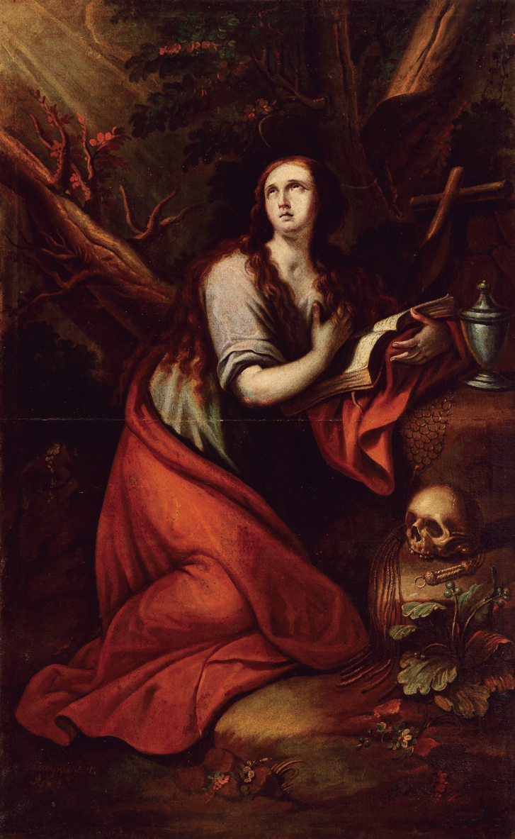 La obra representa a Santa María Magdalena haciendo penitencia por sus pecados.